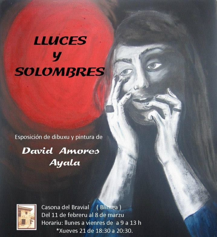 Esposición de pintura "Lluces y solombres"